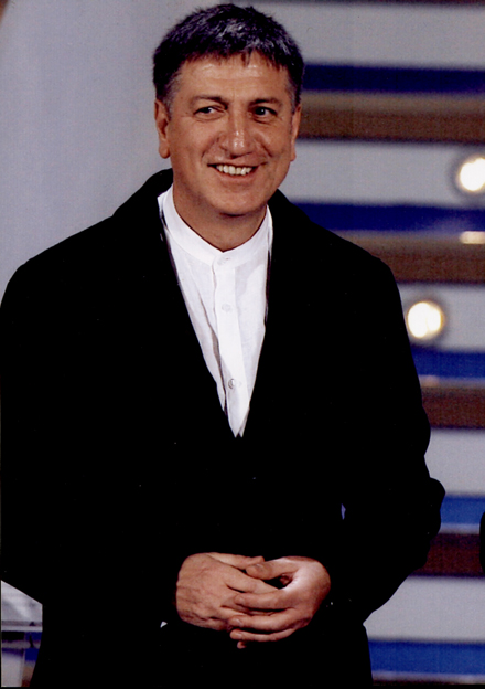 Il regista Francesco Comversano alla premiazione del David di Donatello, Roma 2006.